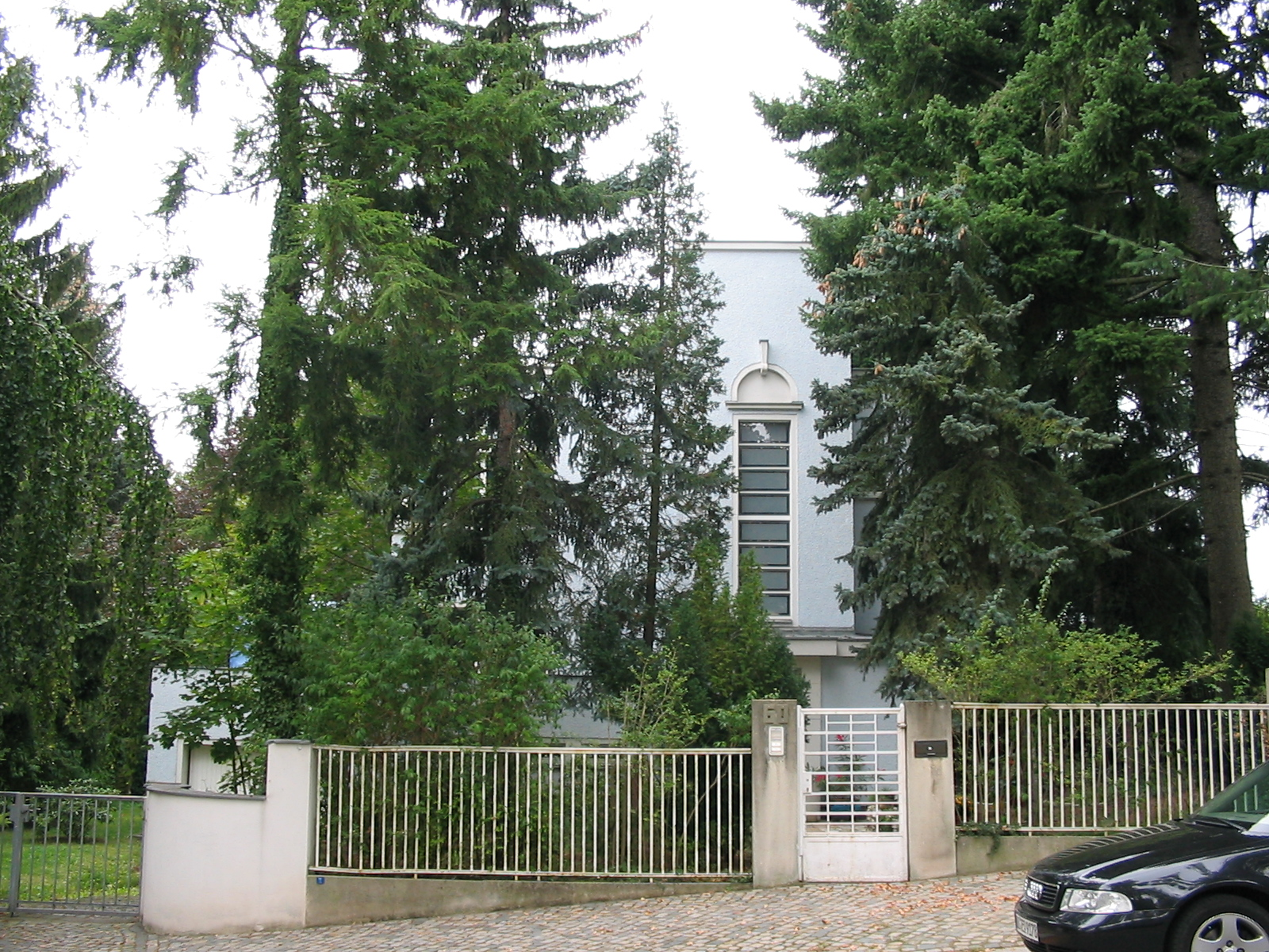 Radebeul Wohnhaus Erich Schönherr